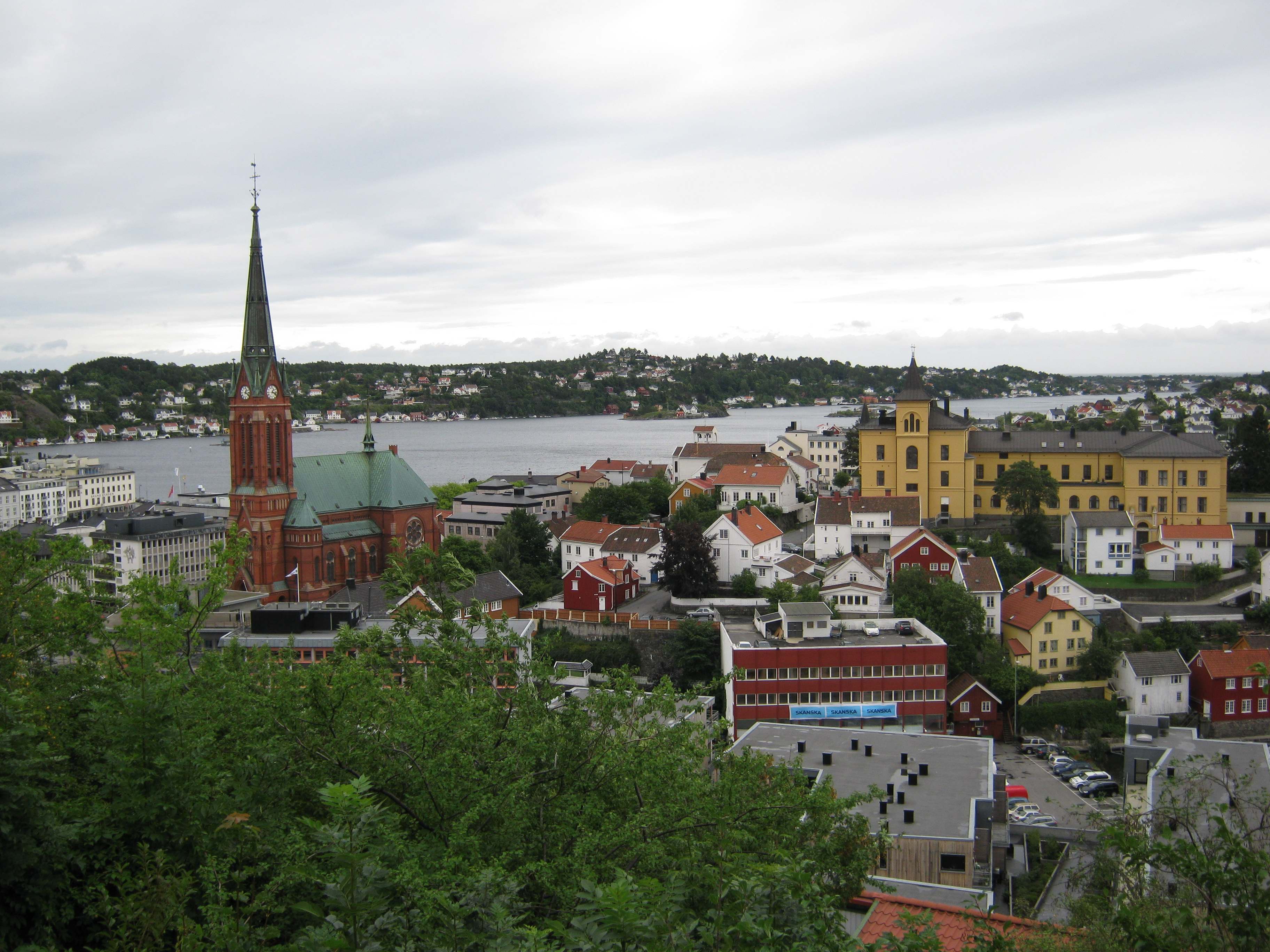 Utsikt fra Høyveien i Arendal, Tyholmen, Trefoldighetskirken, Tromøy i bakgrunnen